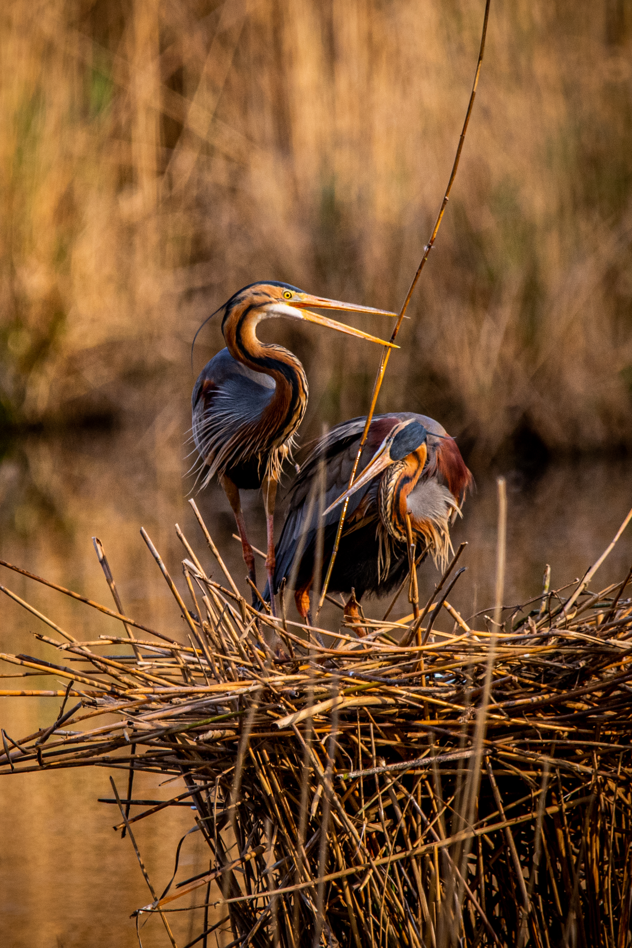 Purpurreiher (Ardea purpurea) beim Nestbau im NSG Wagbachniederung